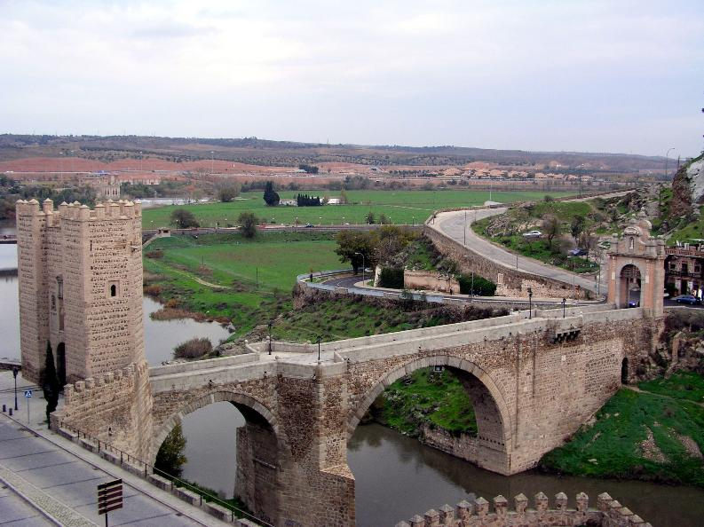 Puente de Alcántara, Toledo, España.